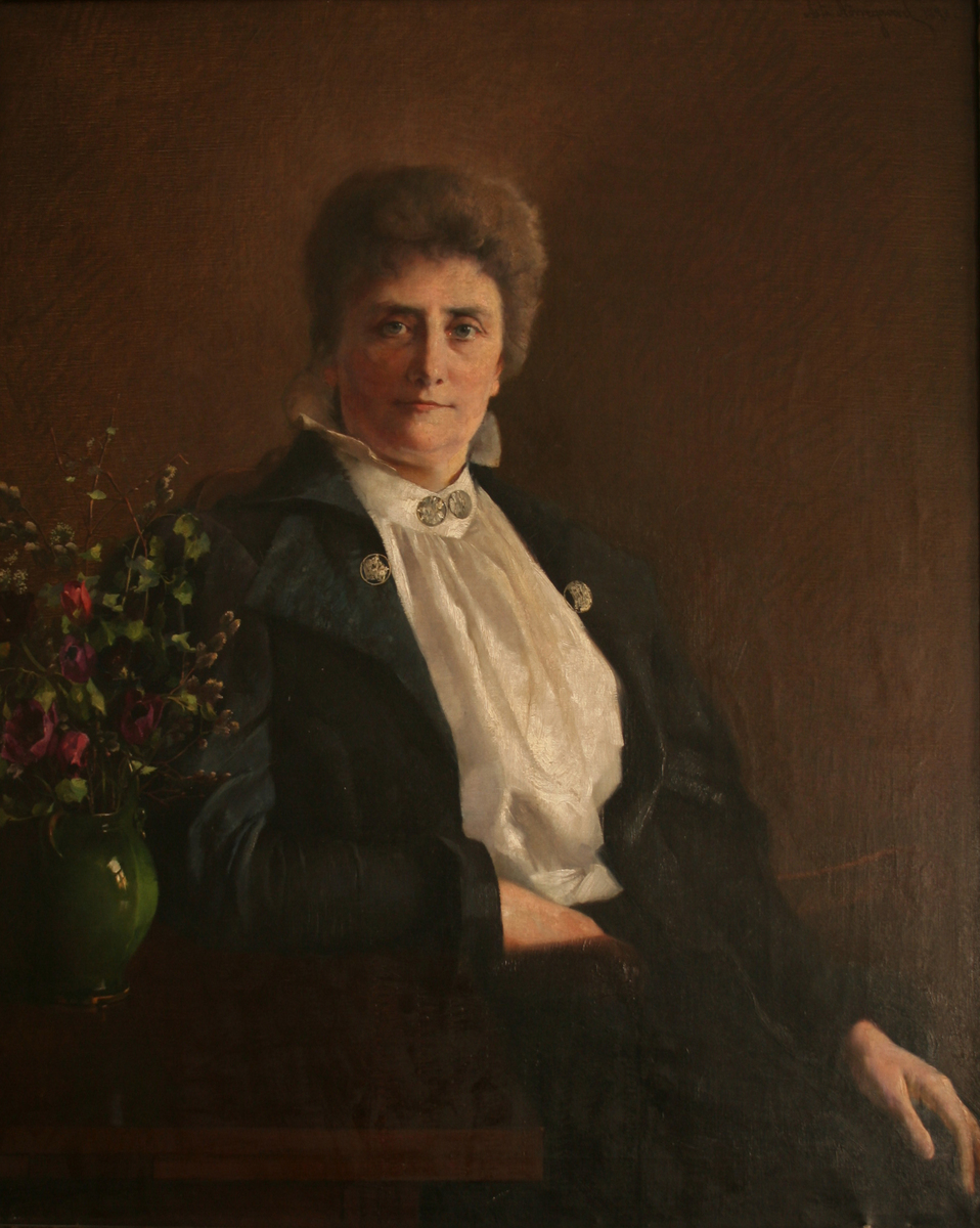 Gina Krog malt av Asta Nørregaard. Maleriet eies av Norsk Kvinnesaksforening.